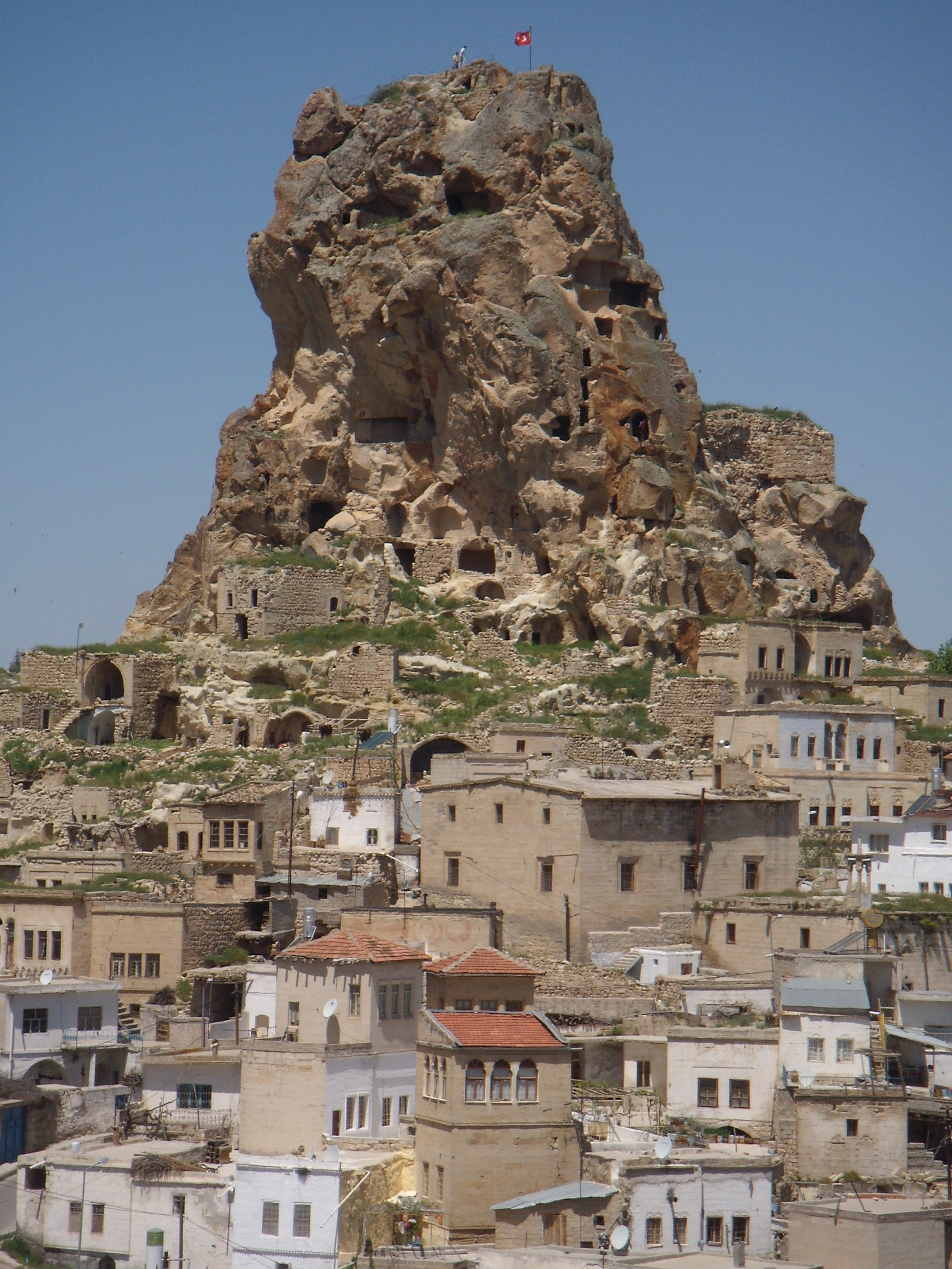 Ortahisar